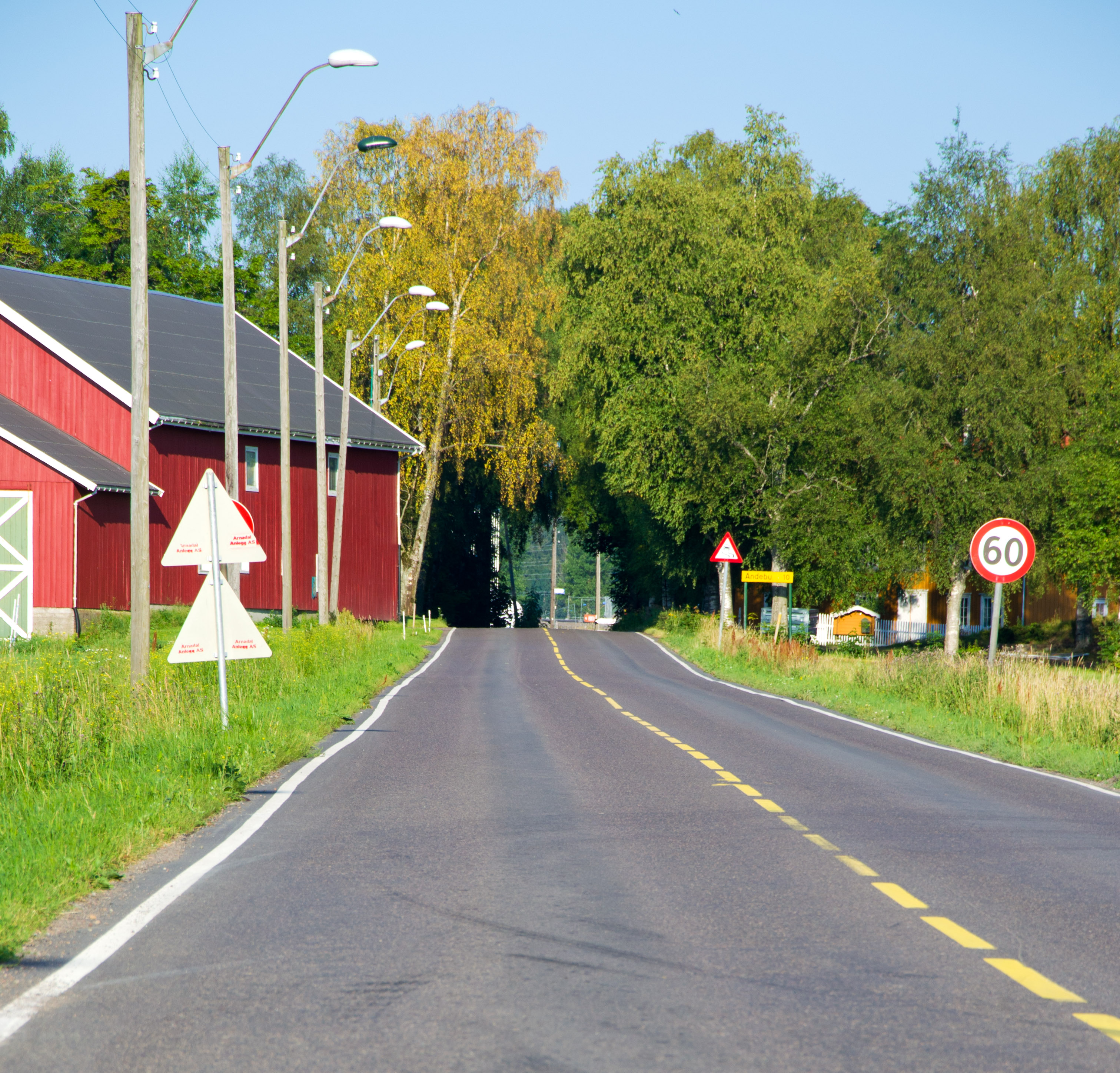 Fylkesvei 523 Andebuveien, Tønsberg, Vestfold